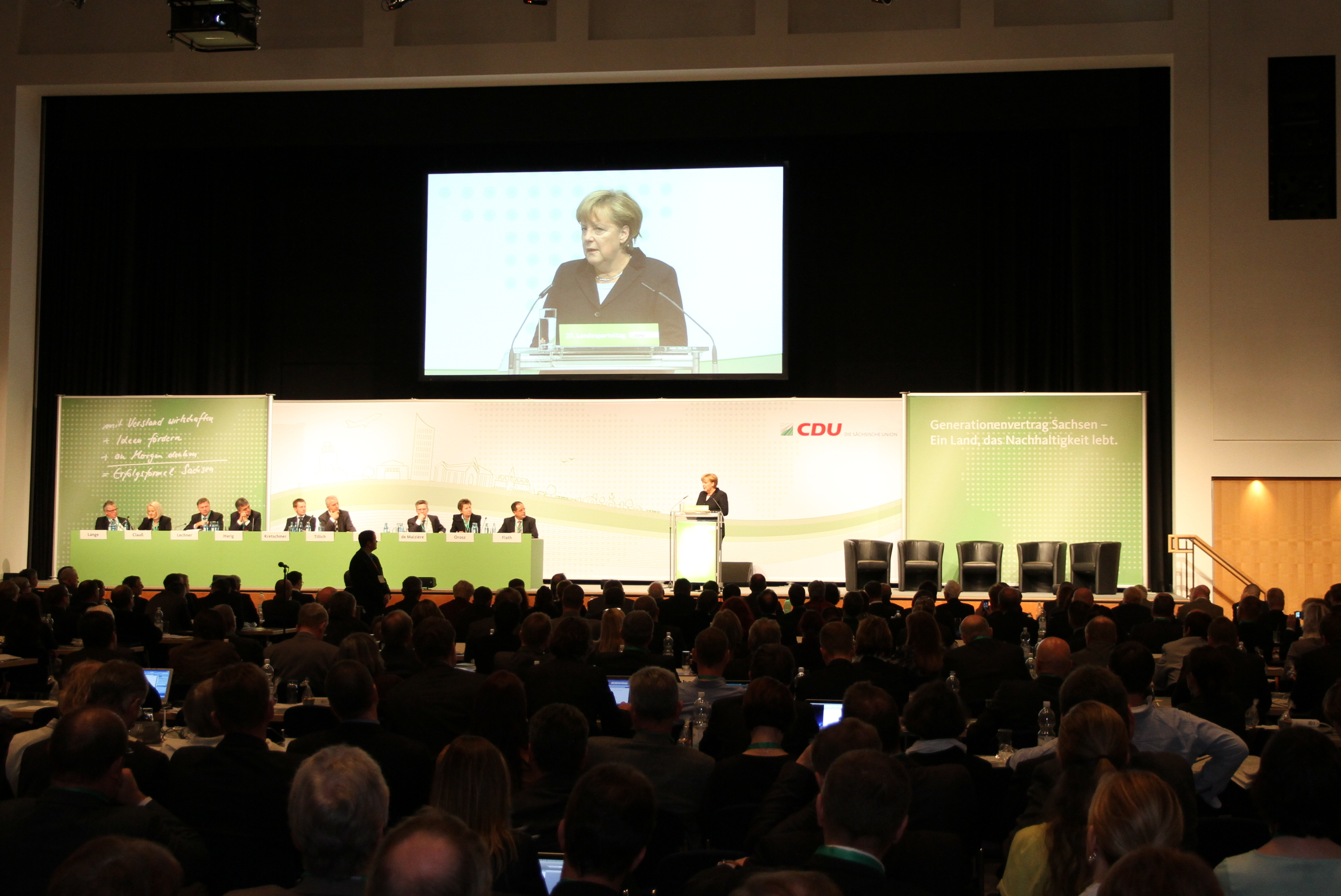 Delegierte und Präsidium mit Bundeskanzlerin Angela Merkel beim 27. Landesparteitag der Sächsischen Union am 17. November 2012 in Leipzig